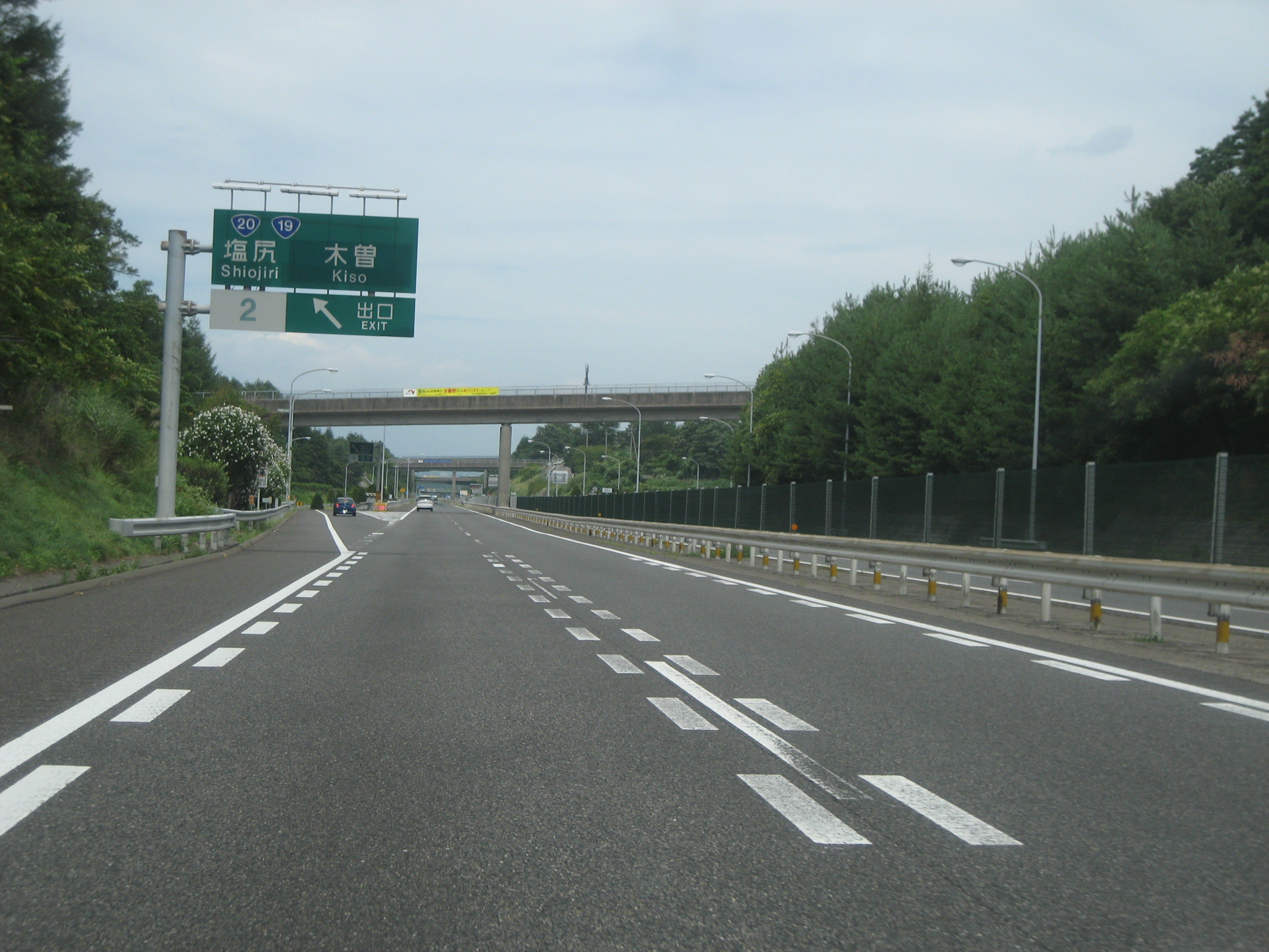 長野自動車道塩尻インター出口付近